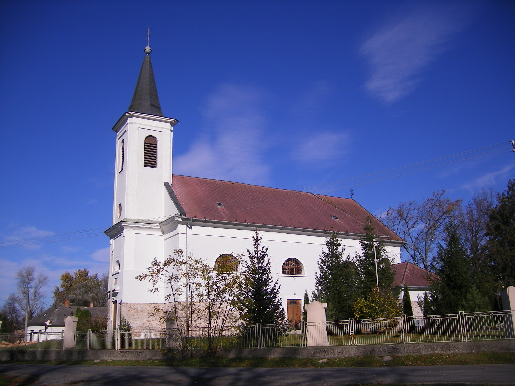 Balony - katolikus templom